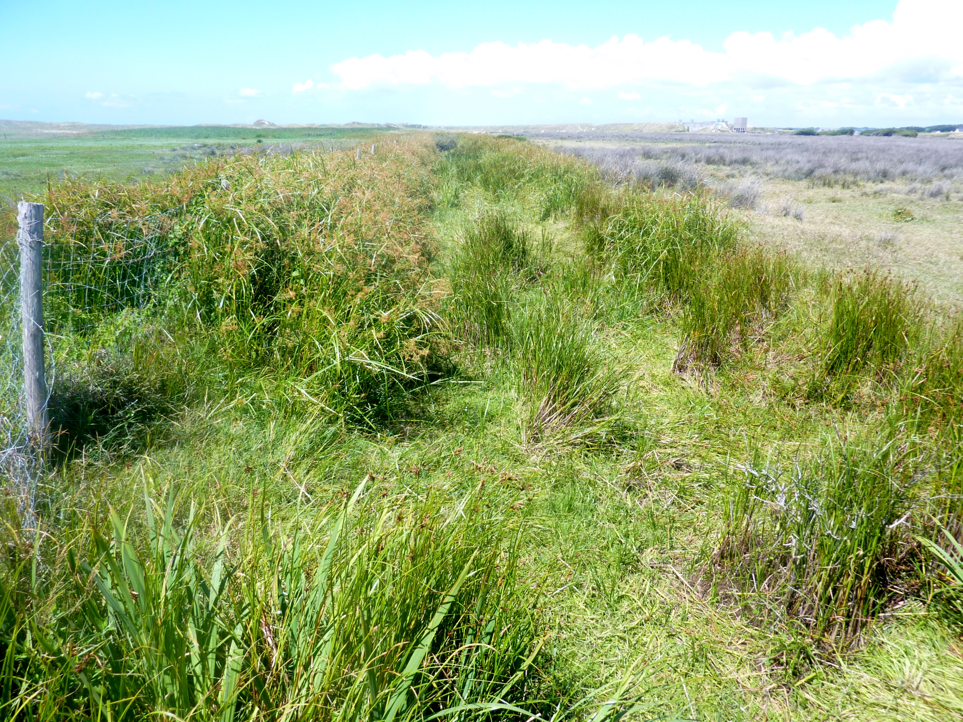 La végétation sur les dunes de Tréguennec à proximité du camp Todt construit par les Allemands pendant la Seconde Guerre mondiale, que l'on aperçoit à l'arrière-plan à droite